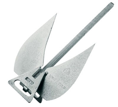 Ancre FOB HP